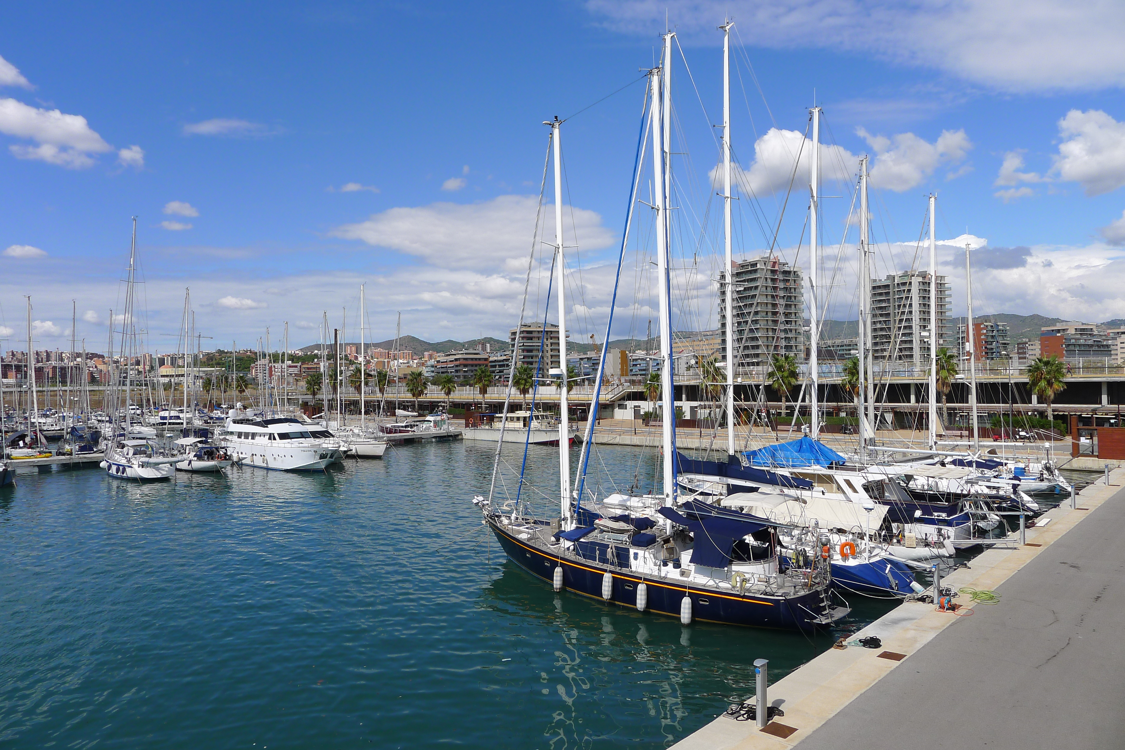 Puerto de Badalona